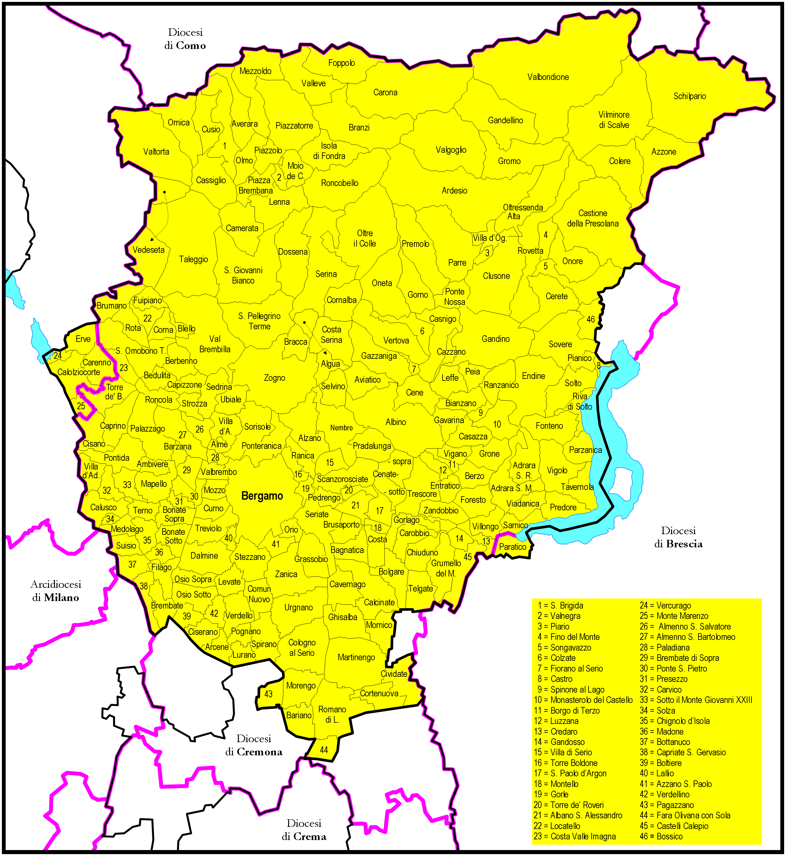 Mappa della Diocesi di Bergamo